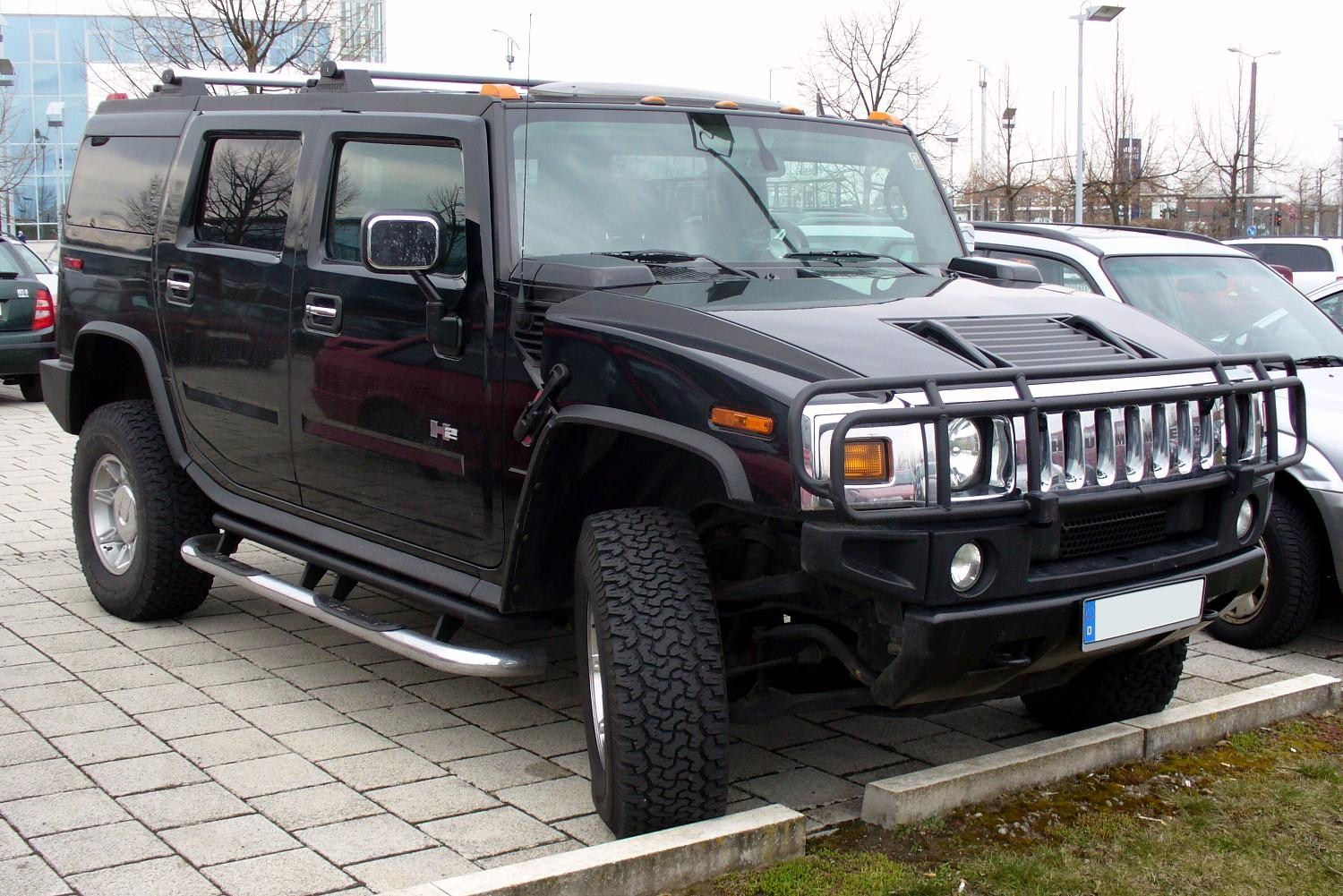 Hummer H2